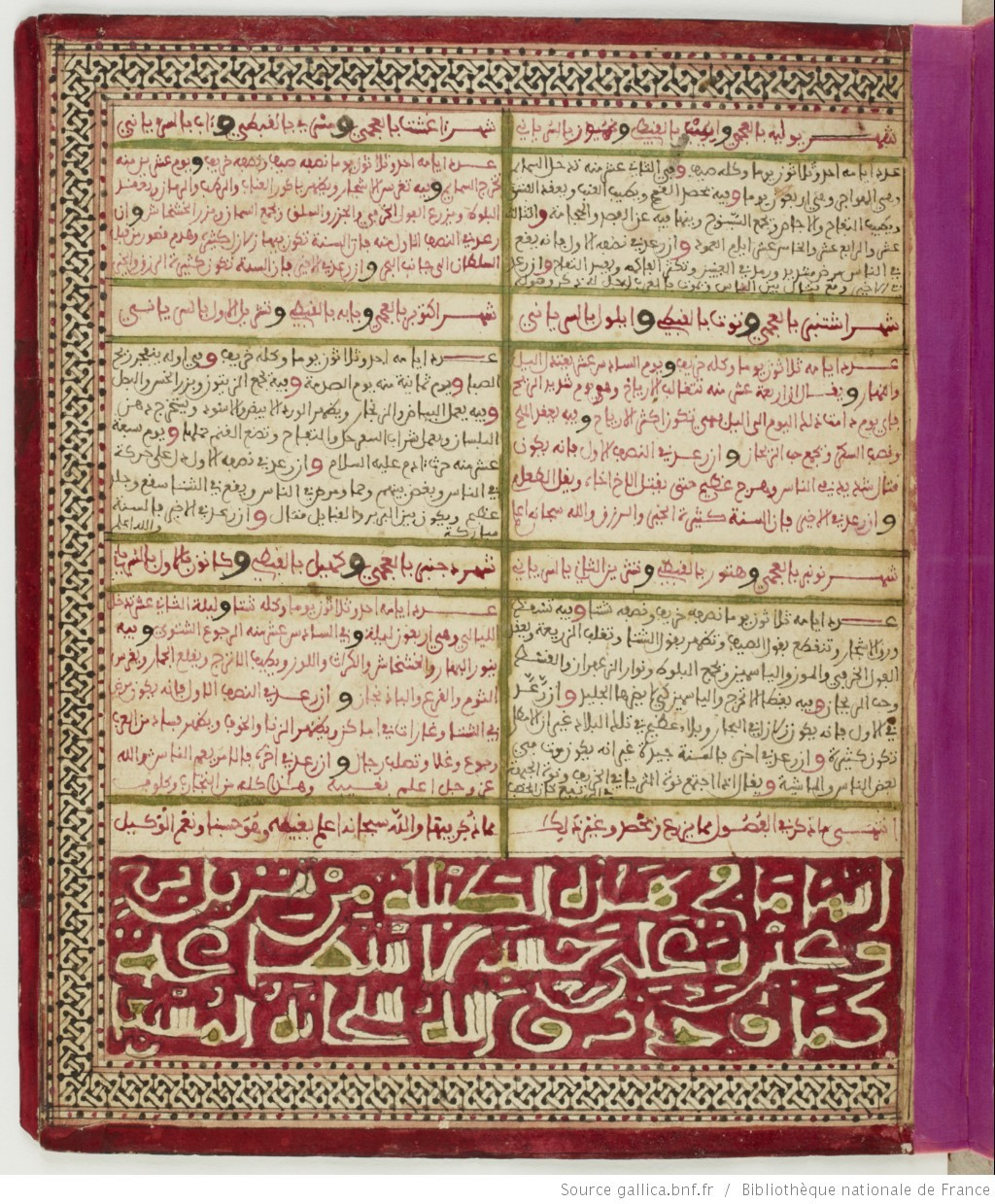 كتاب الطبلة